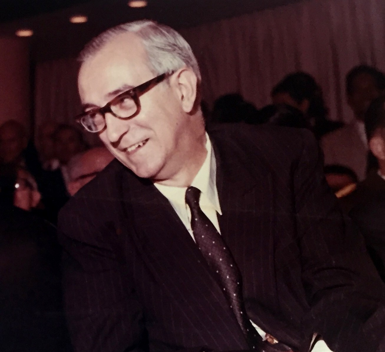 El doctor Edgar Sanabria en la proclamación de Rafael Caldera como Presidente de Venezuela en diciembre de 1968.